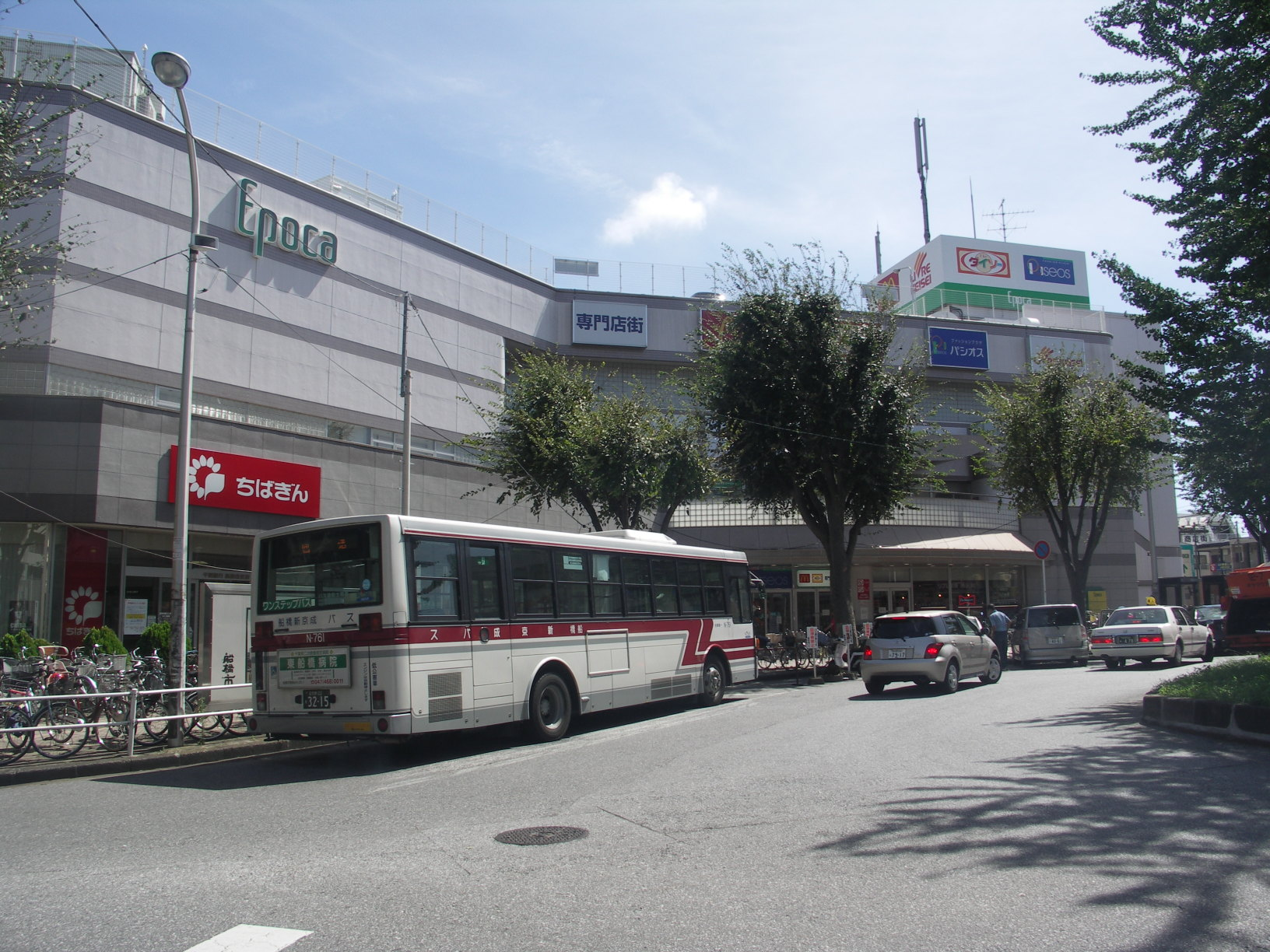 Epoca Takanedai, エポカ高根台